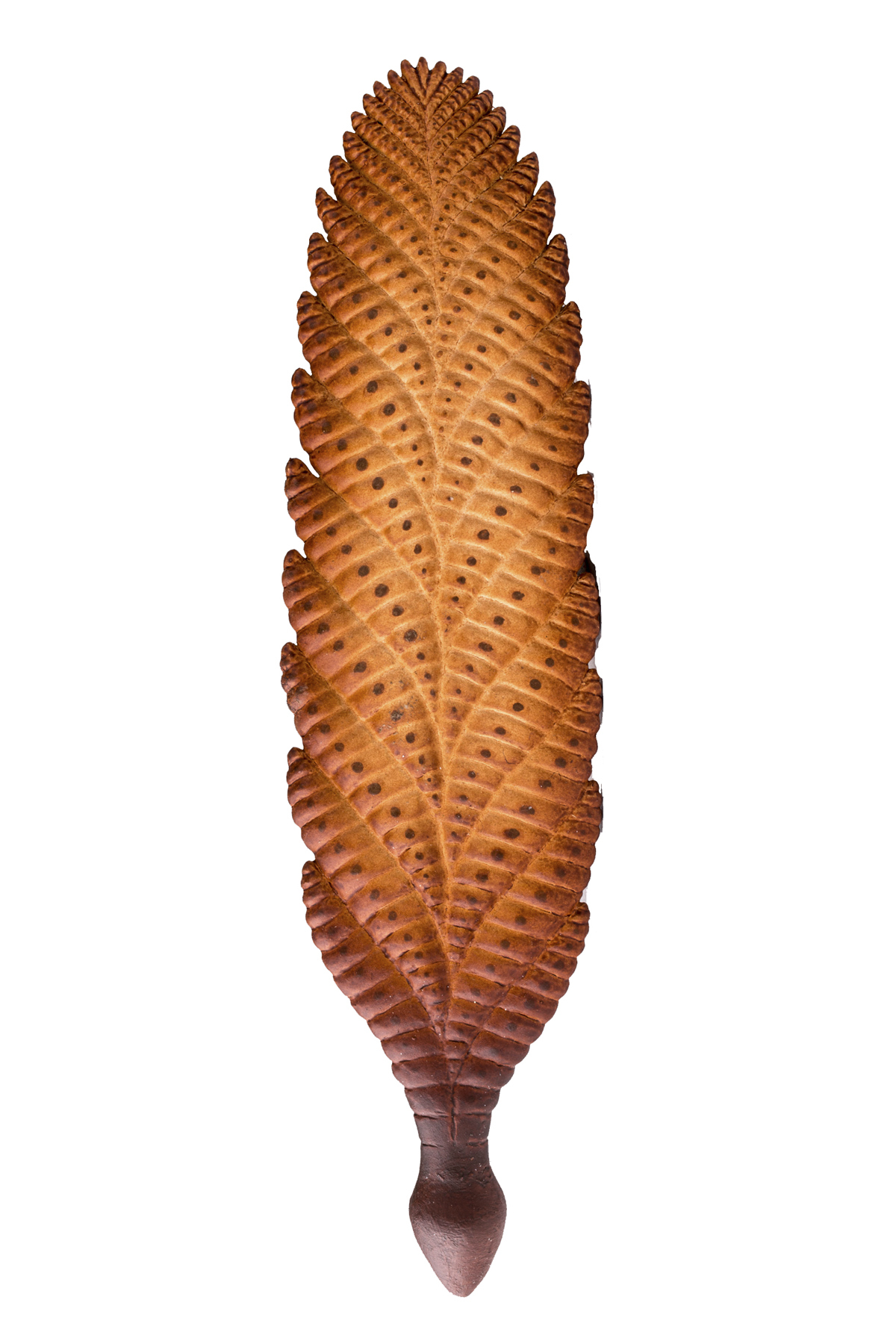 Ricostruzione. Scala 1:1.